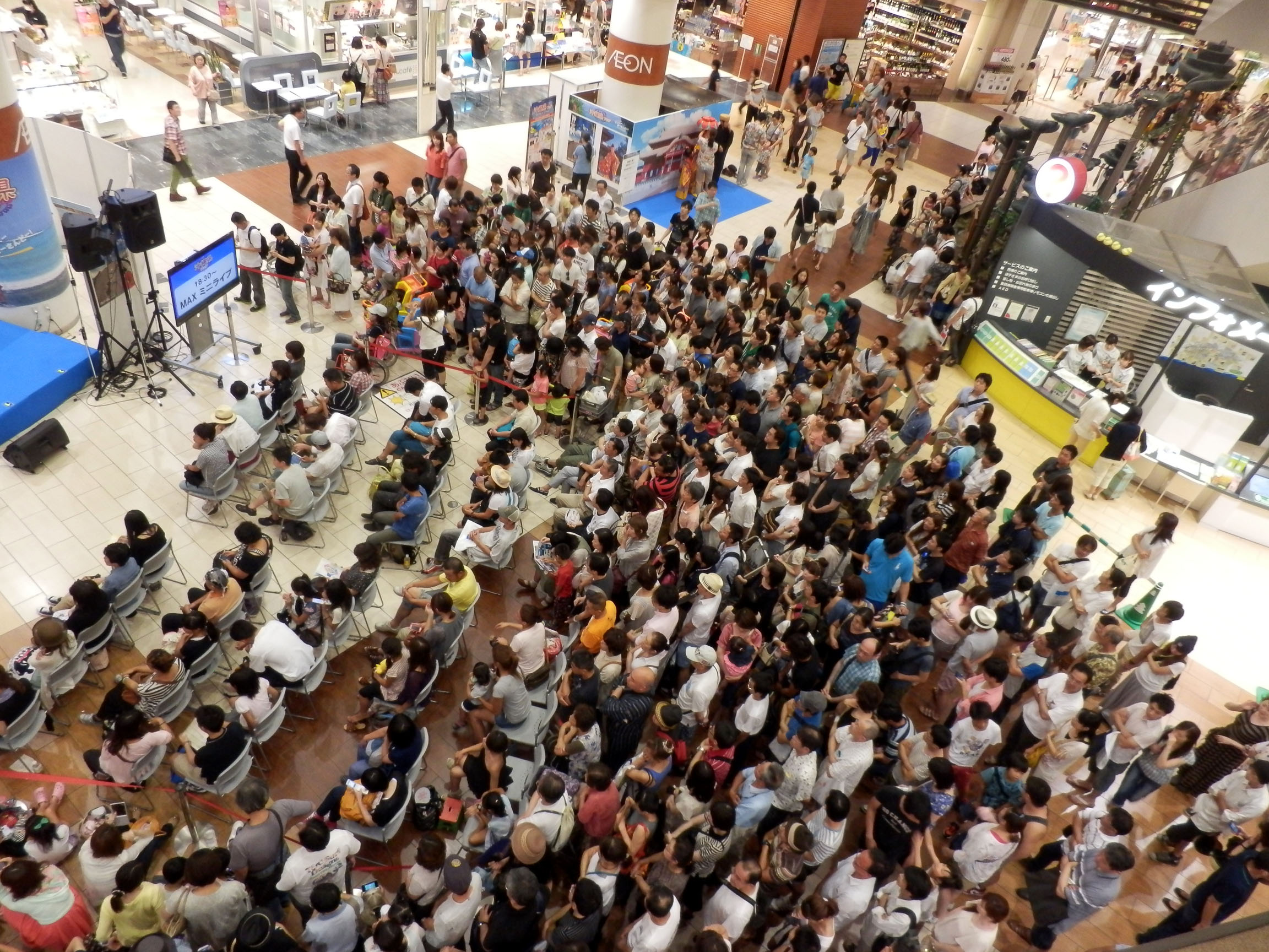 2013年8月24日の夕方、埼玉県越谷市の大型ショッピングセンター・イオンレイクタウンで開かれた MAX のミニライブに集まった人々。これは開演3分ほど前に撮影したもので、最終的に吹き抜けの2階・3階も合わせて600-700人ほどが集まりました。 タワーレコードからのイベント告知 イベント後の Nana からのコメント